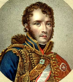 François Antoine Lallemand, général de division et baron de l'Empire (1774-1839).